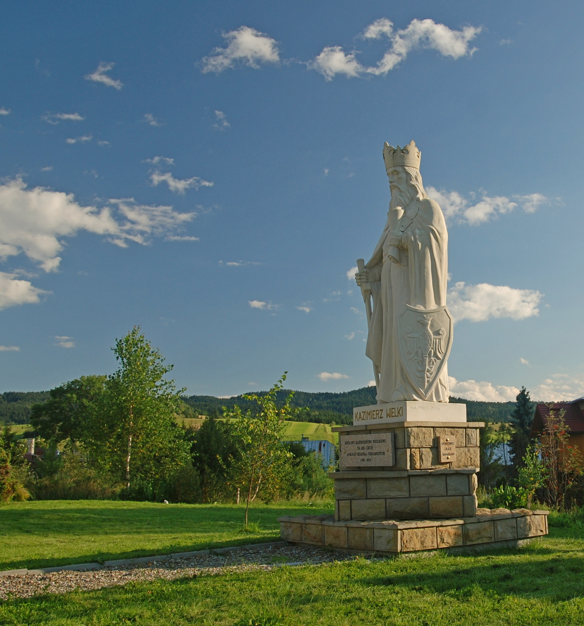 wieś Tylicz